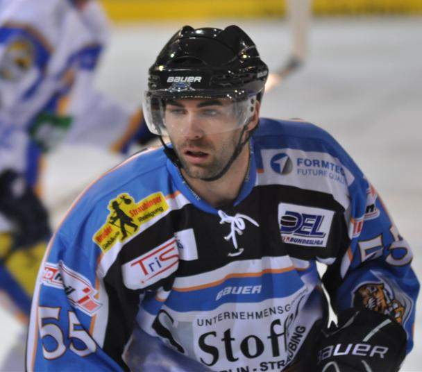 Laurent Meunier